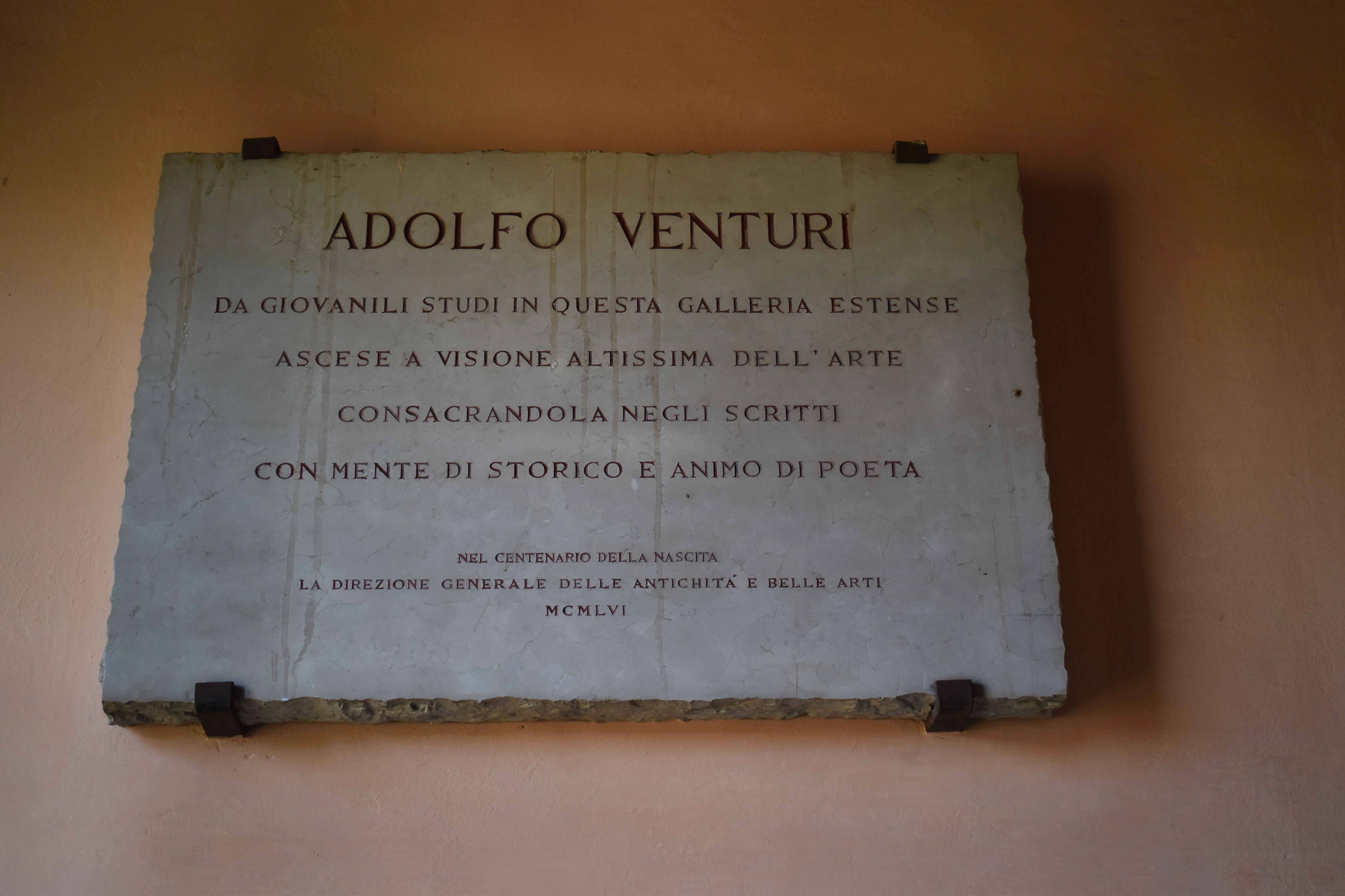 Targa commemorativa per il centenario della nascita di Adolfo Venturi collocato presso la galleria Estense di Modena